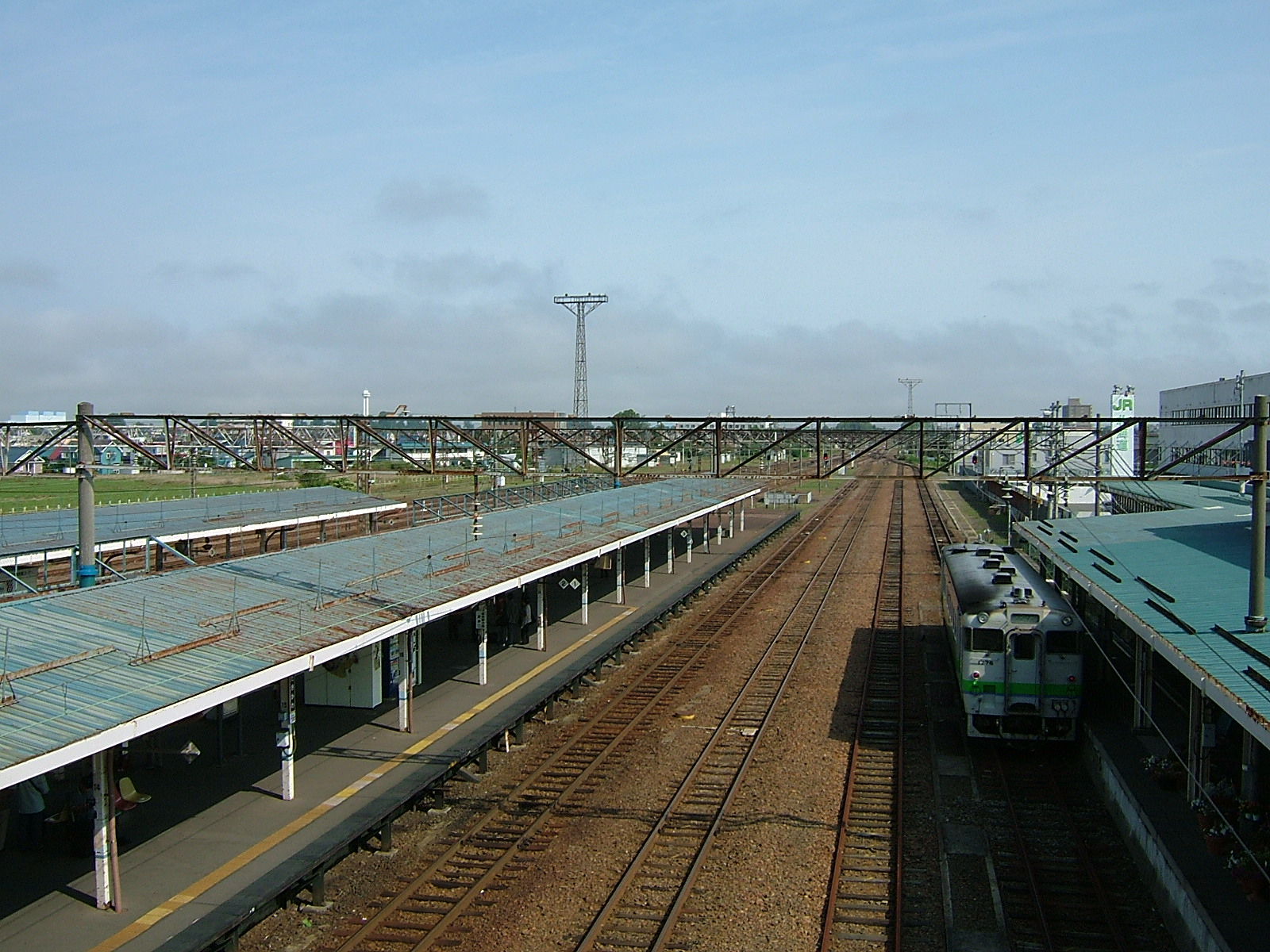 JR北海道滝川駅構内（跨線橋より撮影）